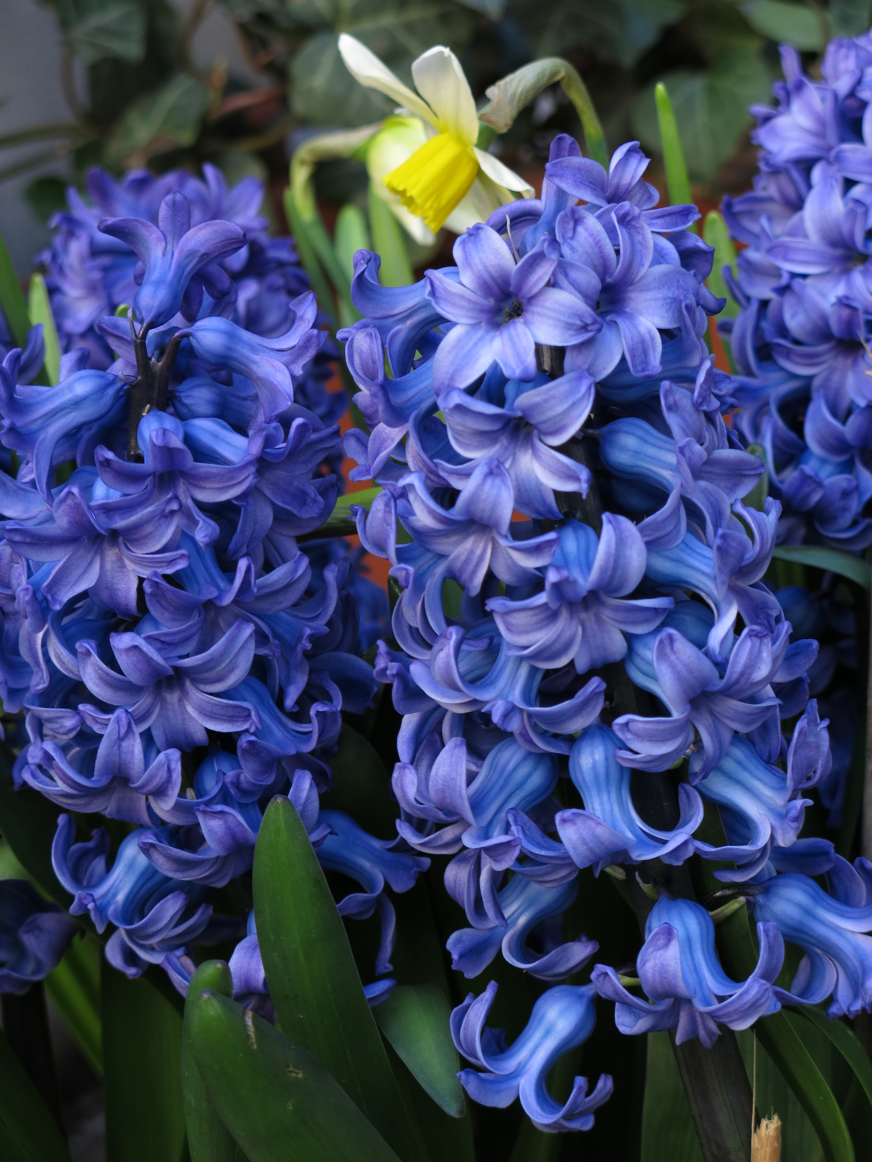 Hyazinthen bildfüllend